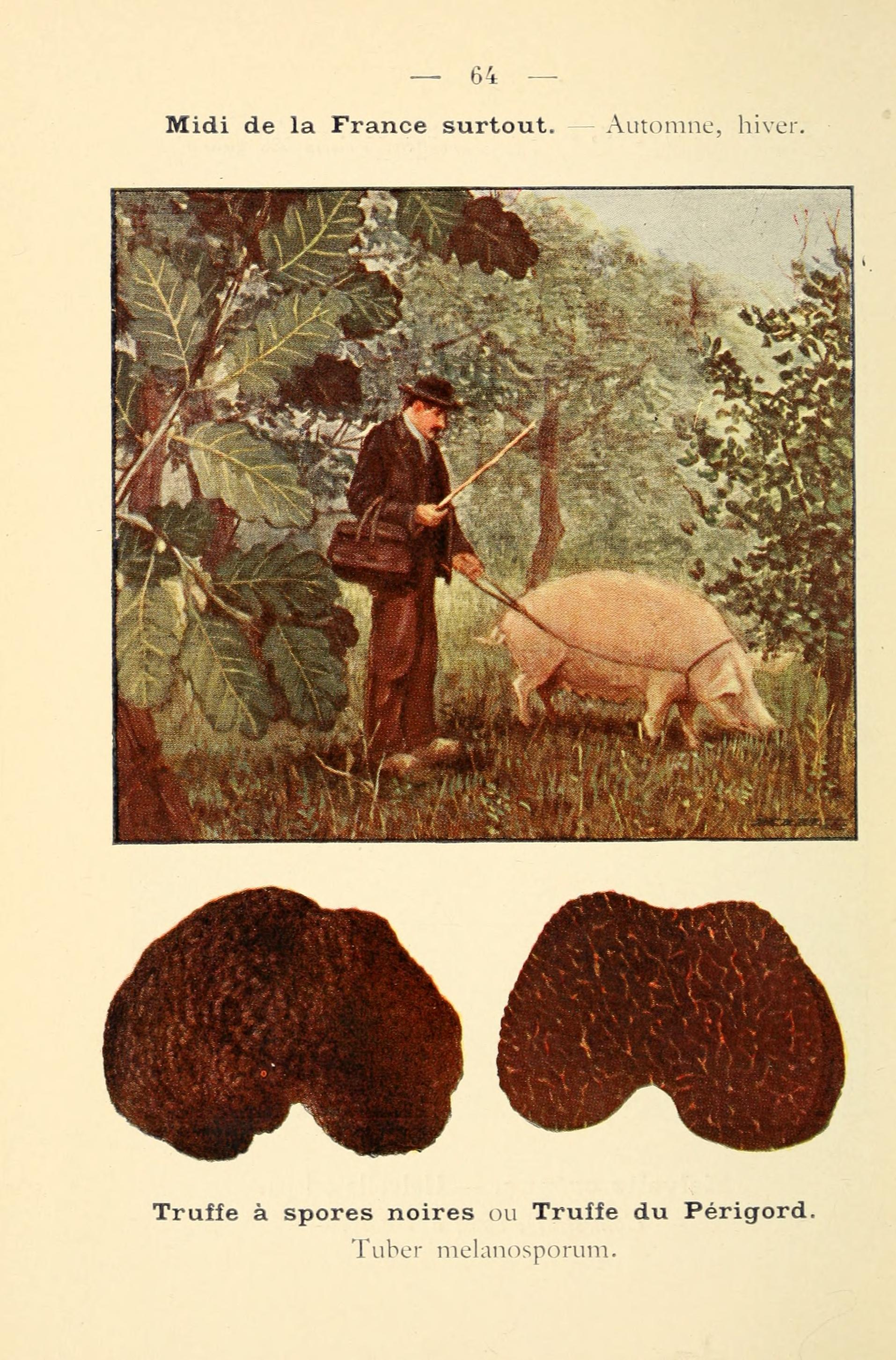 Nouvel atlas de poche des champignons comestibles et vénéneux.